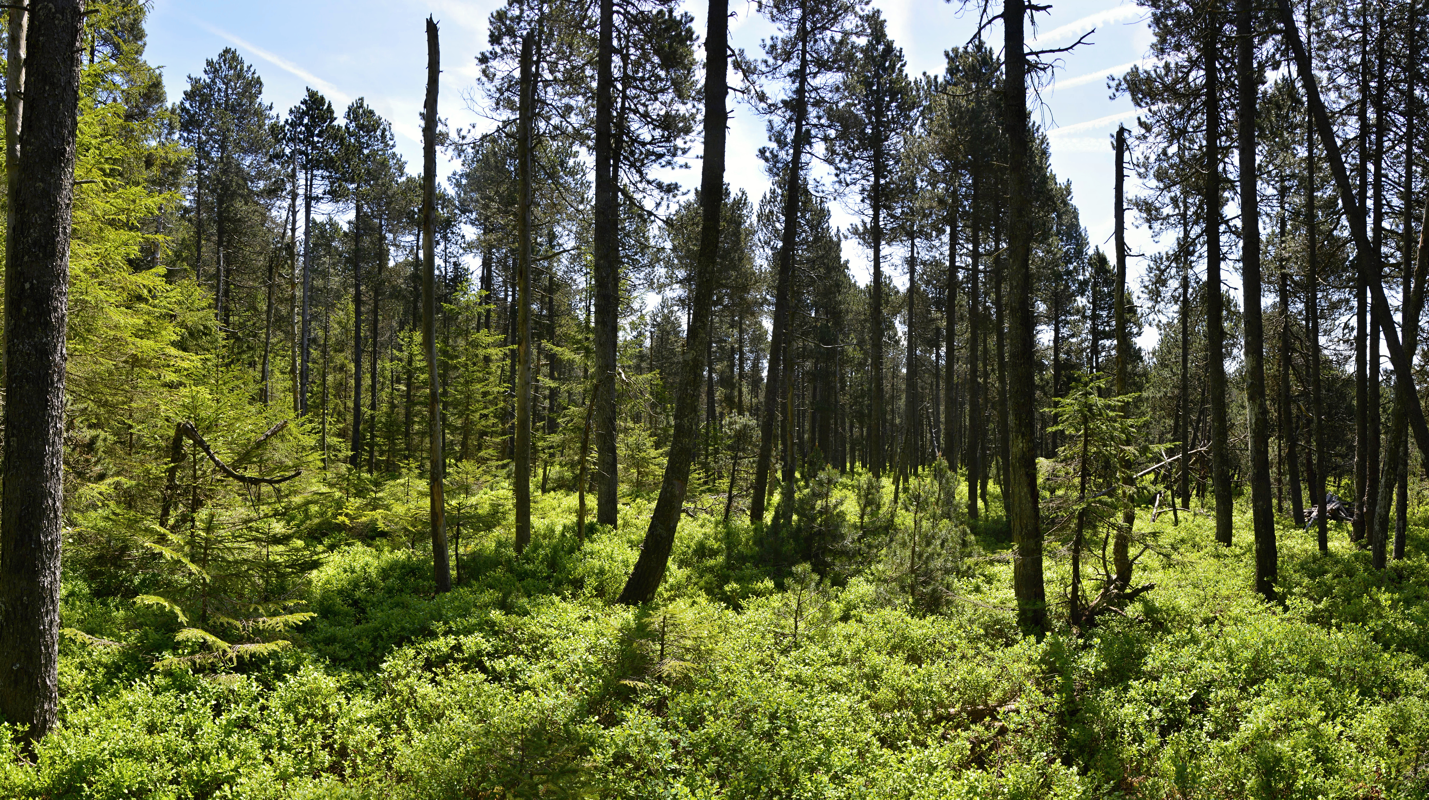 NSG-Schönleitenmoos bei Buchenberg, südlich der B12 im Wierlinger Wald. Hochmoor mit Spirkenbestand und Heidelbeer-Rauschbeerunterwuchs im Übergangsbereich zum Fichtenwald.